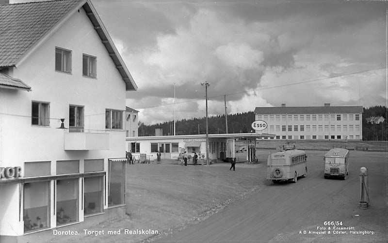 Torget med Realskolan, bensinstation och bussar.; Bensinstation; Byggnadsverk; Kommunikationsväsen; Miljöer; Torgmiljö